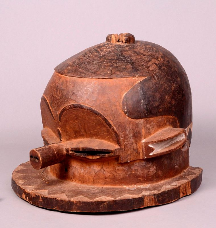 Maschera elmo Kipoko con amplie arcate sopraccigliari, occhi a fessura (con apertura che consente al danzatore di vedere), naso cilindrico con narici forate proiettato orizzontalmente in avanti, orecchie laterali. Un forellino sotto il naso a indicare la bocca. La base circolare con motivi triangolari rappresenta la barba. Sulla sommità il punto di attacco del pennacchio (mancante). Maschera con funzioni protettive. Simboleggia il lato benevolo e fecondo del potere del capo; i grandi occhi, il naso prominente e le orecchie proiettate lateralmente sottolineano il suo potere di controllo. La bocca ridotta a un forellino sottolinea che è bene pensare prima di parlare.